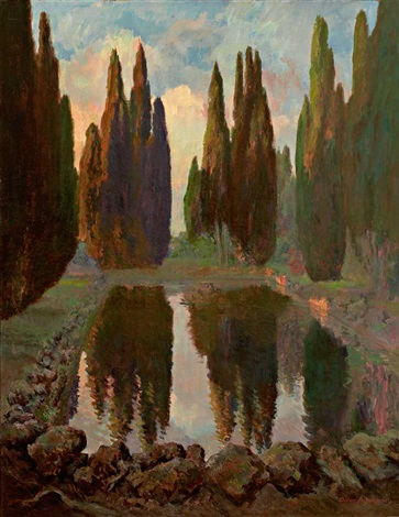 Zypressenteich der Villas Falconieri bei Rom